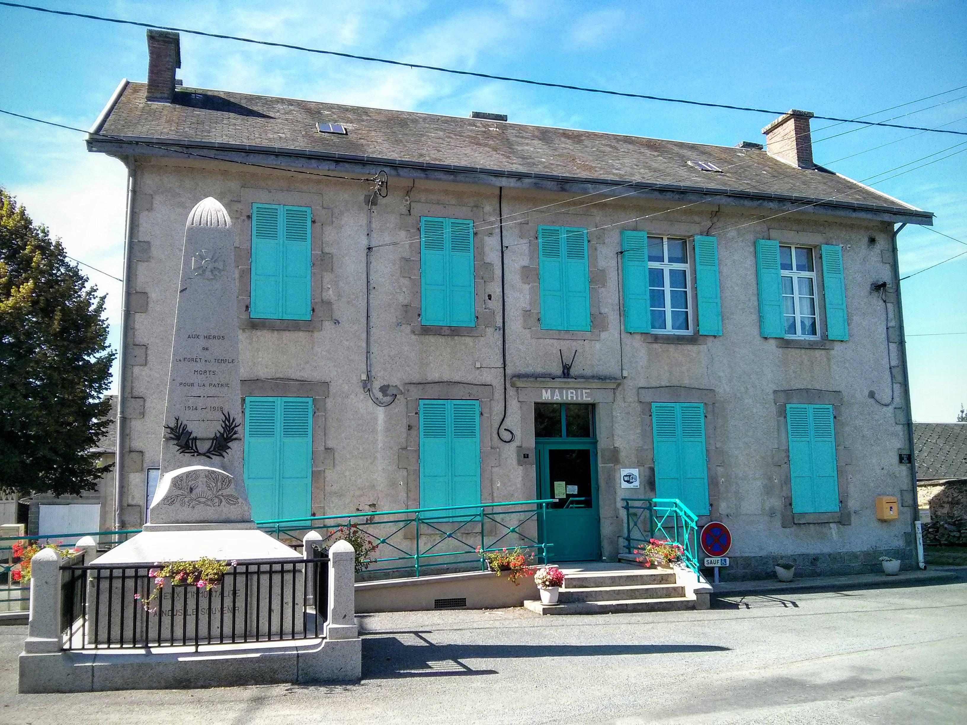 Vue de face depuis l'autre côté de la place du Pilori de la mairie (ancienne école) et monument aux morts de la Forêt-du-Temple, Creuse, Limousin, France.